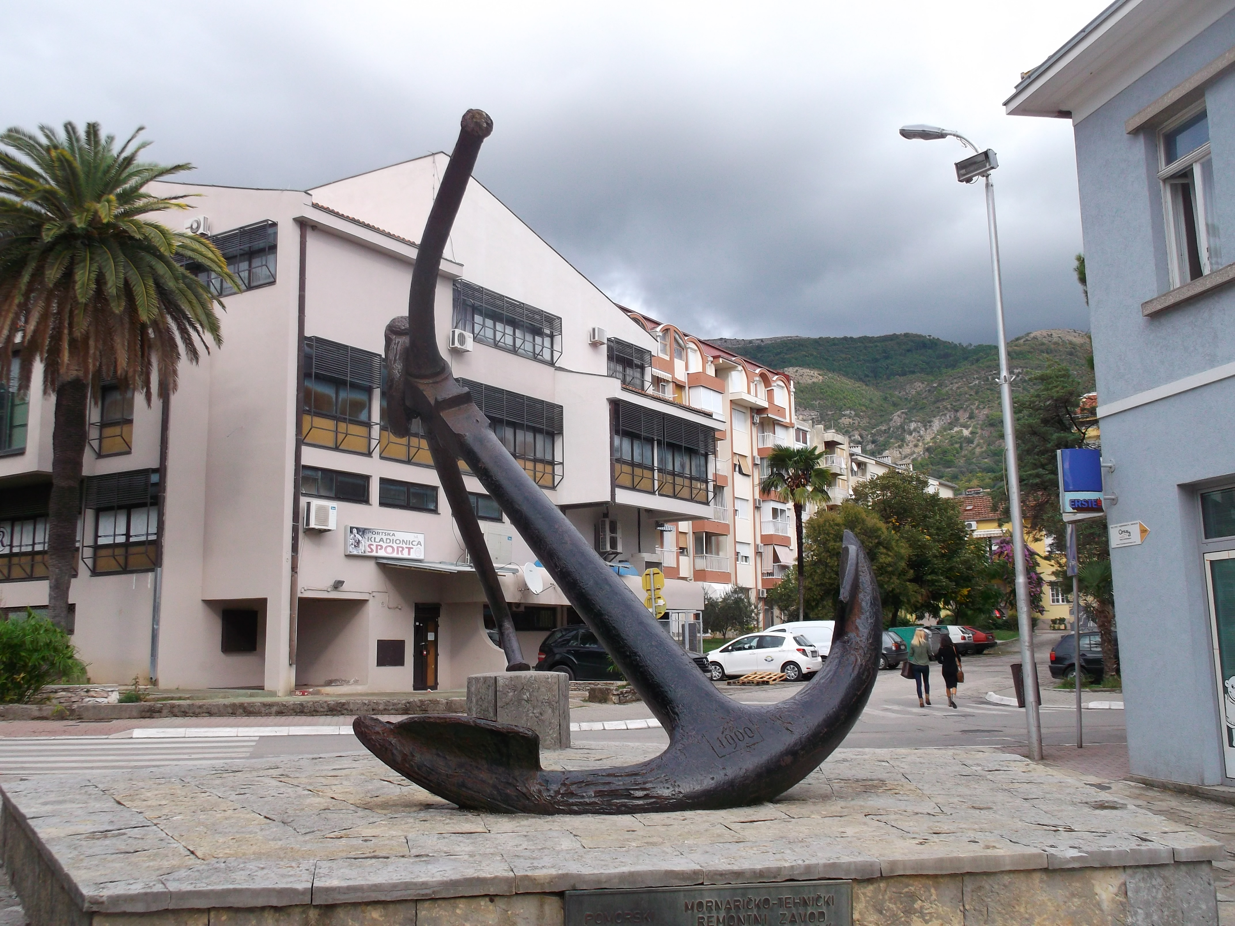 Tivat, Montenegro